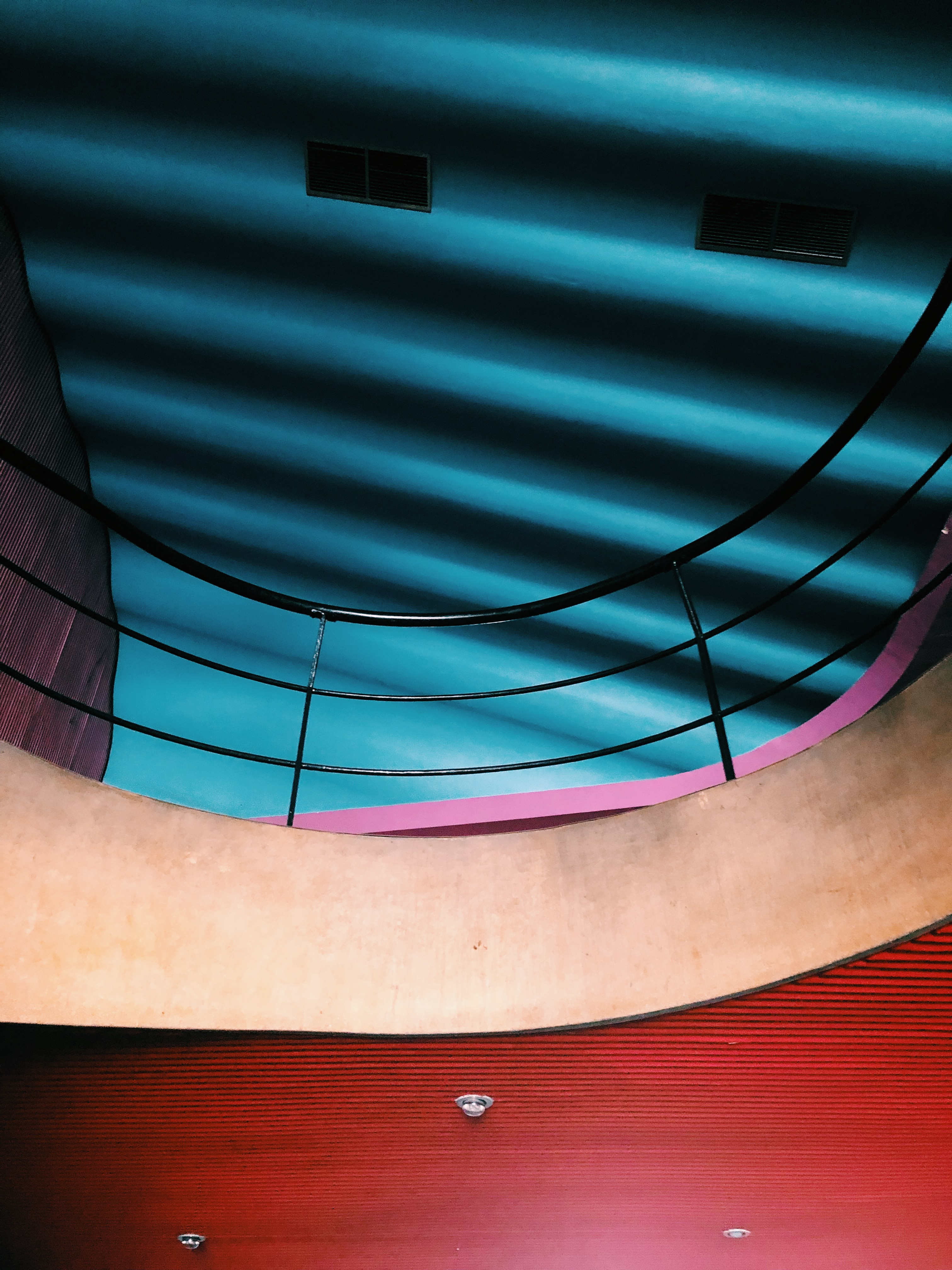 سينما لينكس في الدار البيضاء